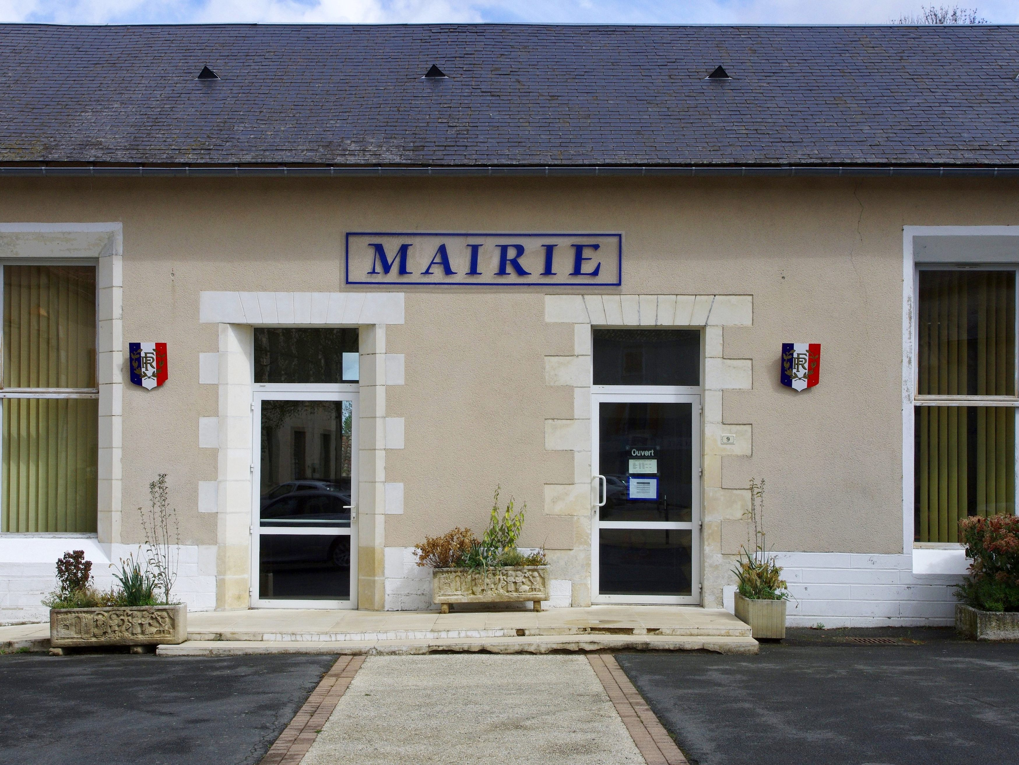 Entrée de la mairie, place du 8 Mai 1945. Romagne, Vienne, France.